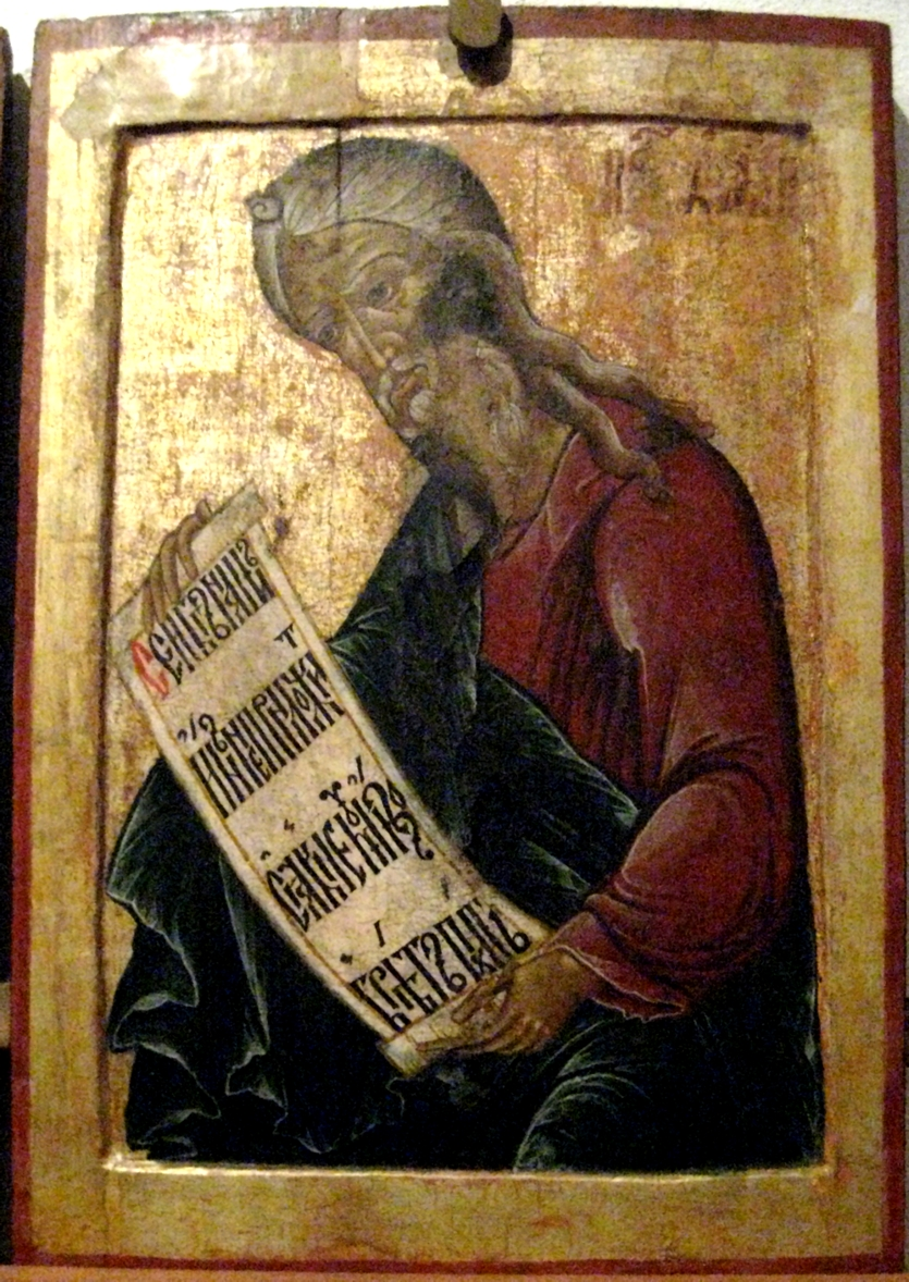 Пророк Варух. Иконописец Терентий Фомин (?) Вологда (уп. 1646–1670). Церковь Епифания Кипрского Кирилло-Белозерского монастыря